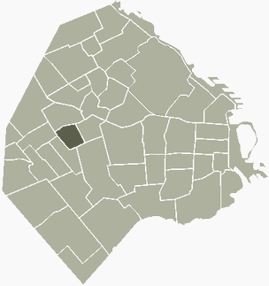 Barrio de Villa Santa Rita